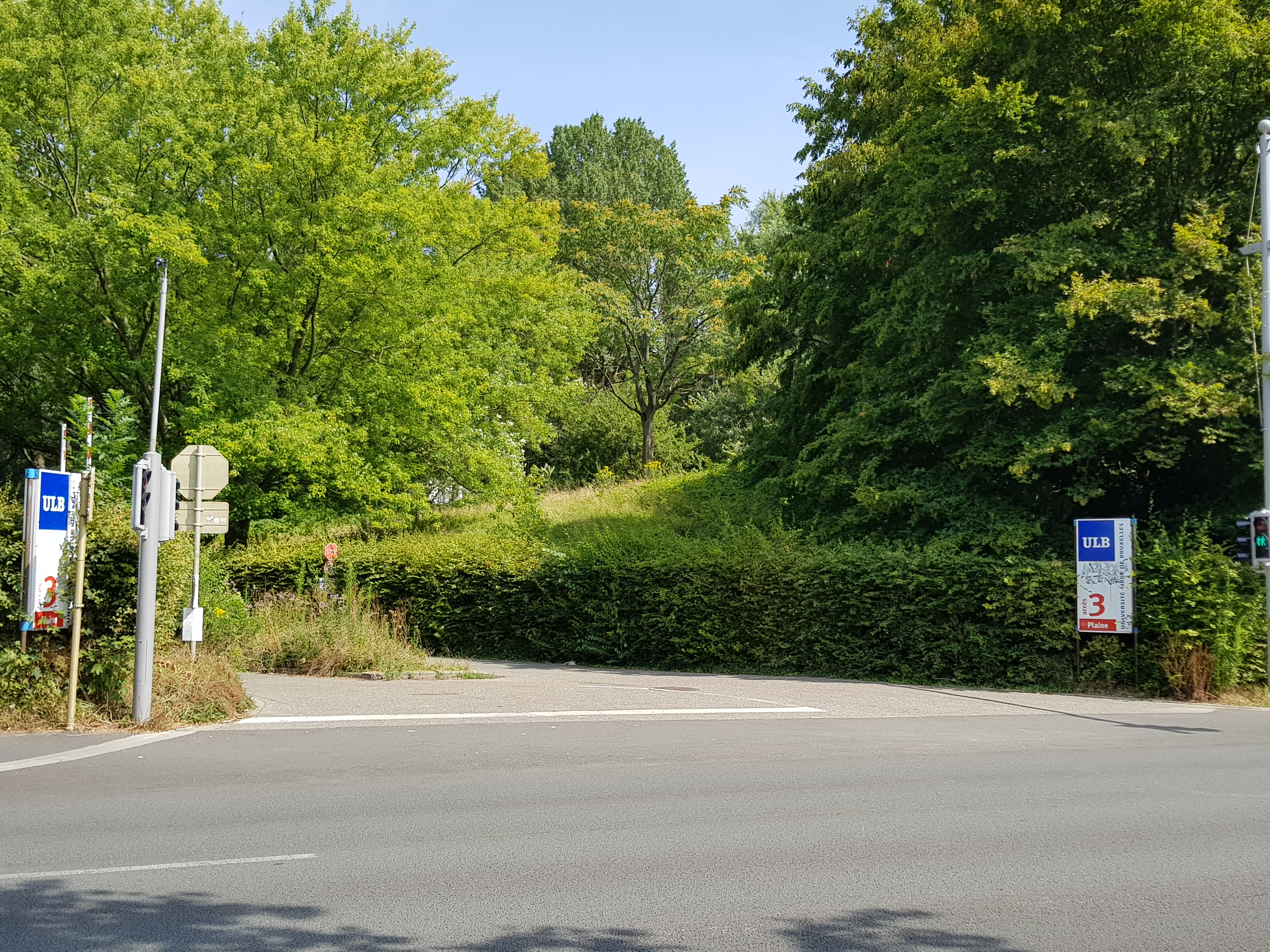 Accès 3 au Campus de la Plaine de l'ULB, boulevard du Triomphe, Bruxelles, Belgique.